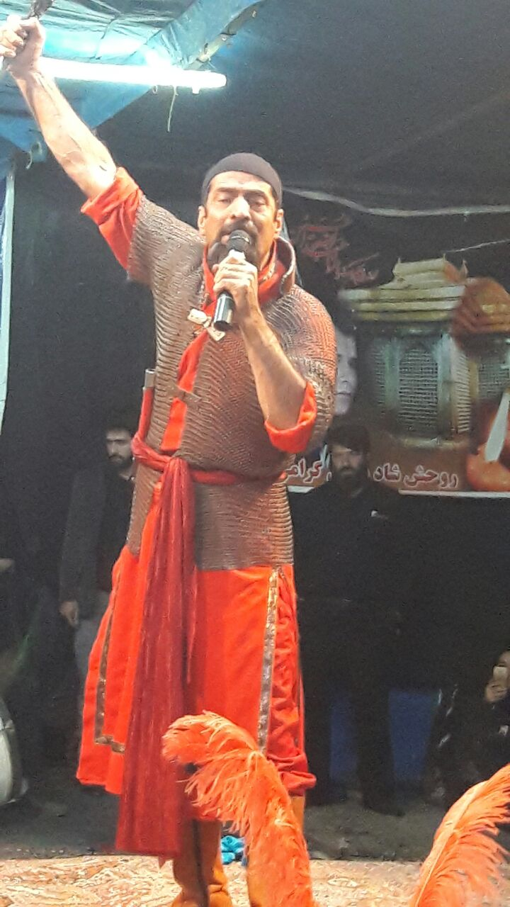 تعزیه حر ابن یزید ریاحی در شهر قم , فلکه شهرداری